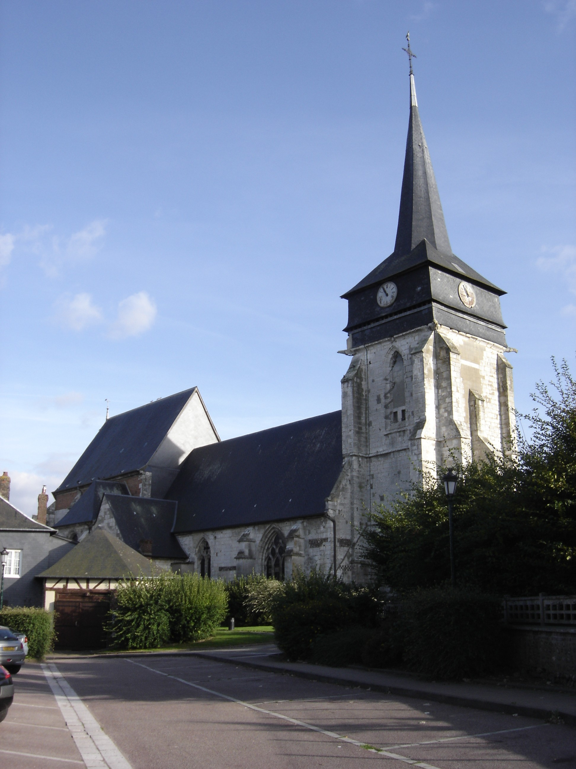 Église Saint-Laurent de Bourgtheroulde - Eure - France